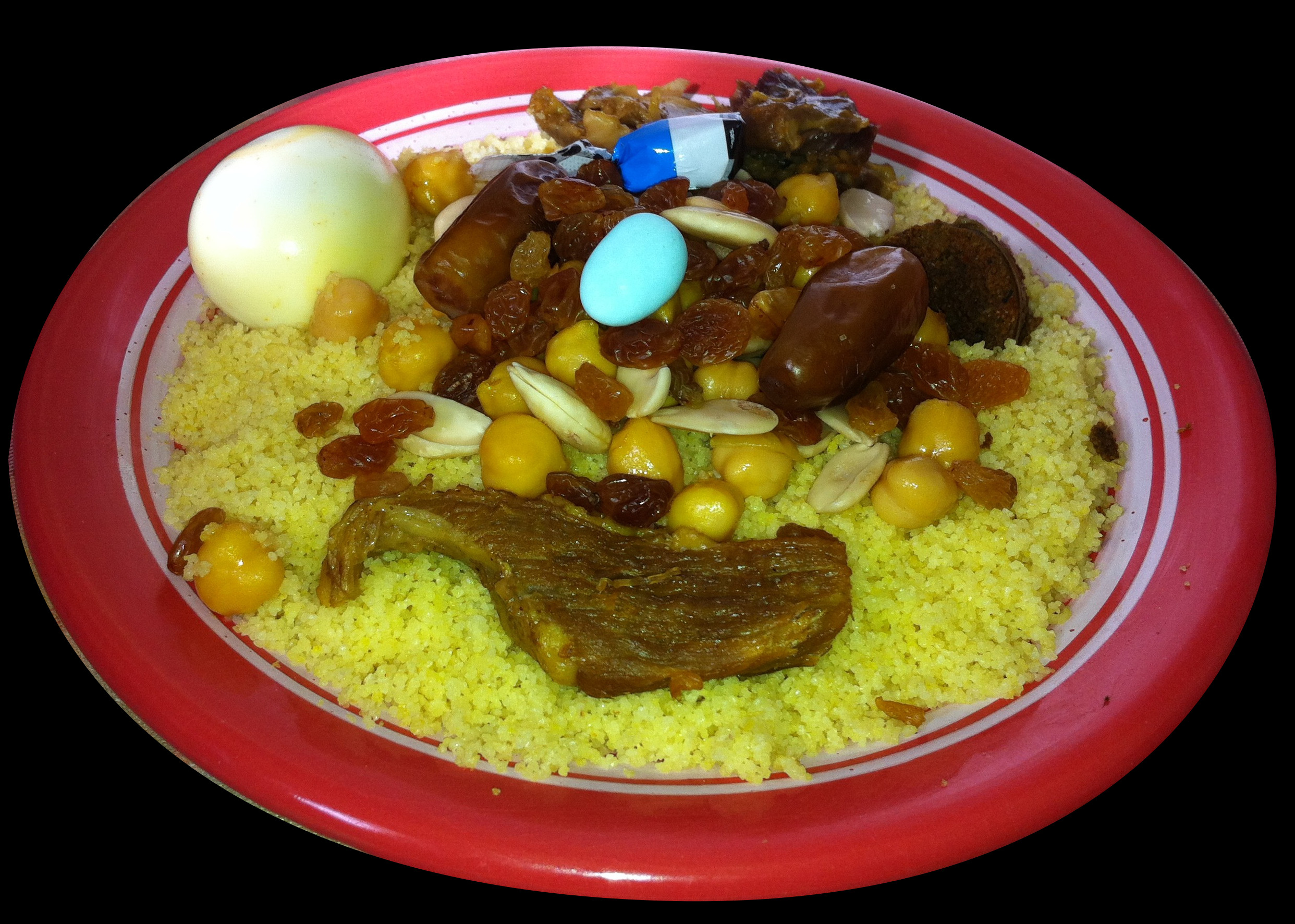 Coucous préparé à la nouvelle année de l'hégire à la ville de Nabeul